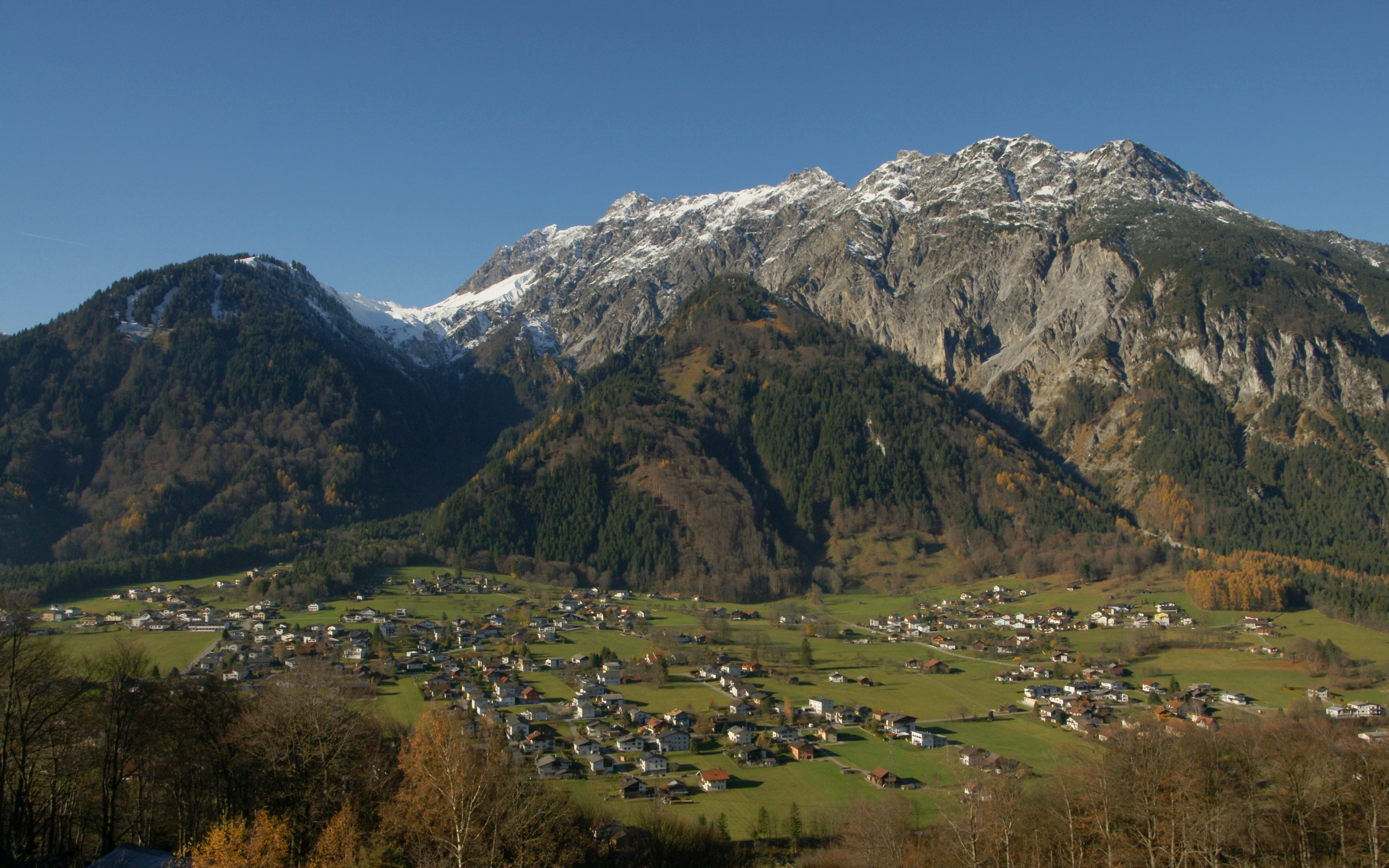 Vom Jetzmunt auf Vandans und die Vandanser Steinwand im Rätikon.